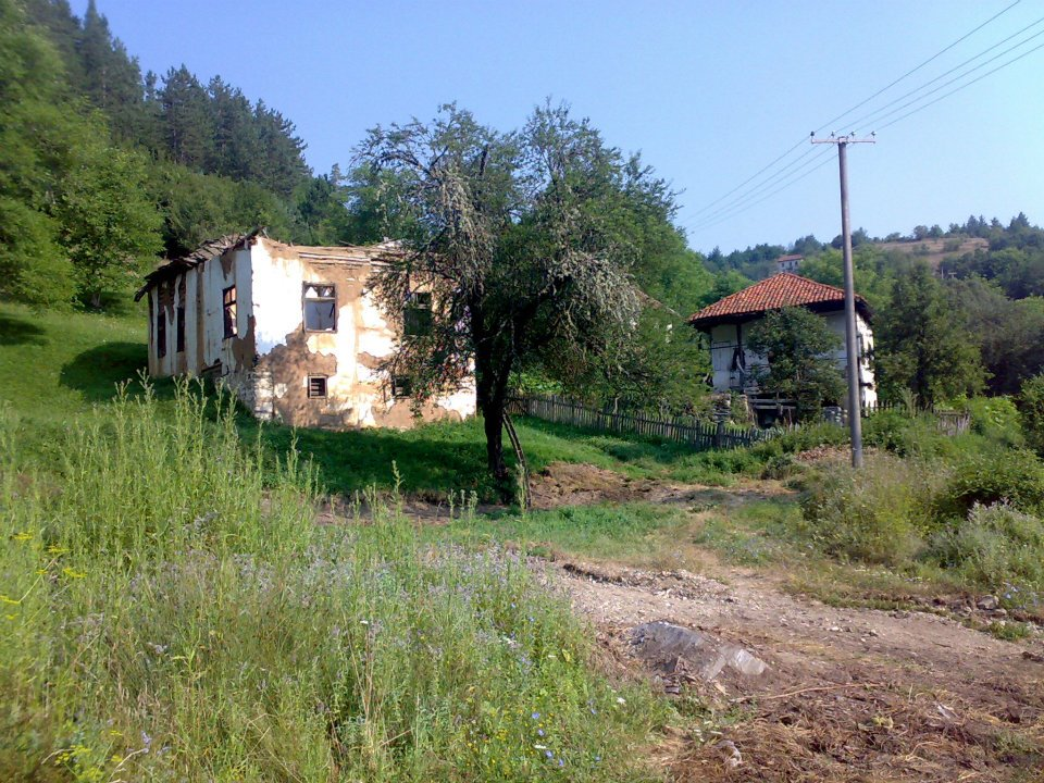 Stara skola u Bresnici